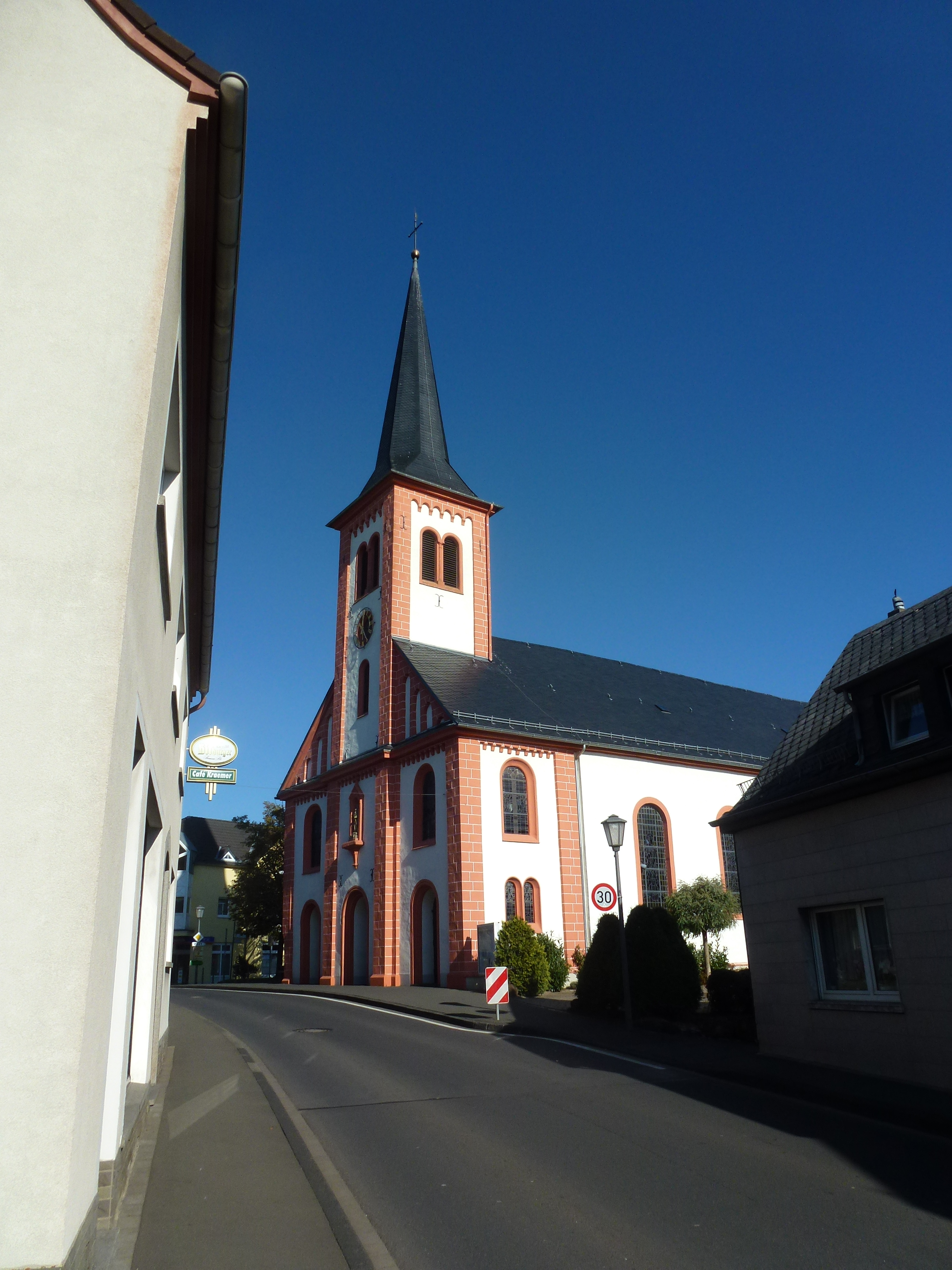 Katholische Pfarrkirche St Joseph Stadtkyll